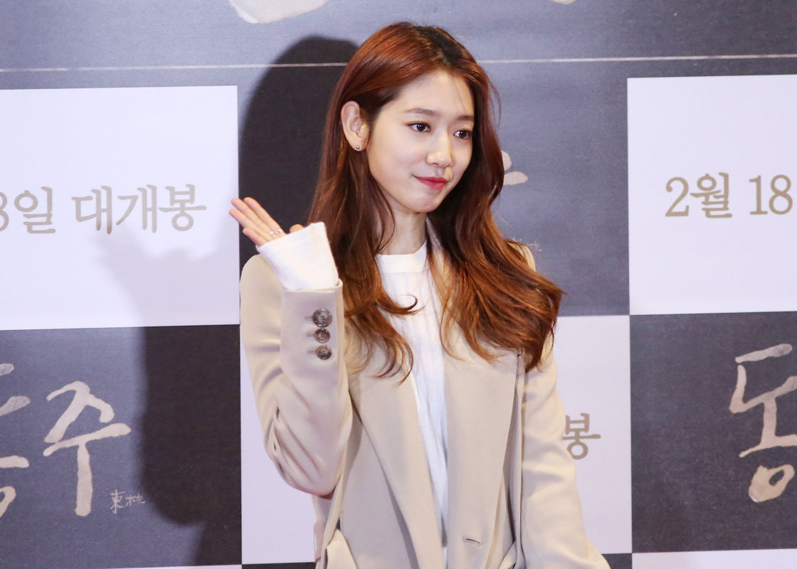 160204 동주 시사회 박신혜